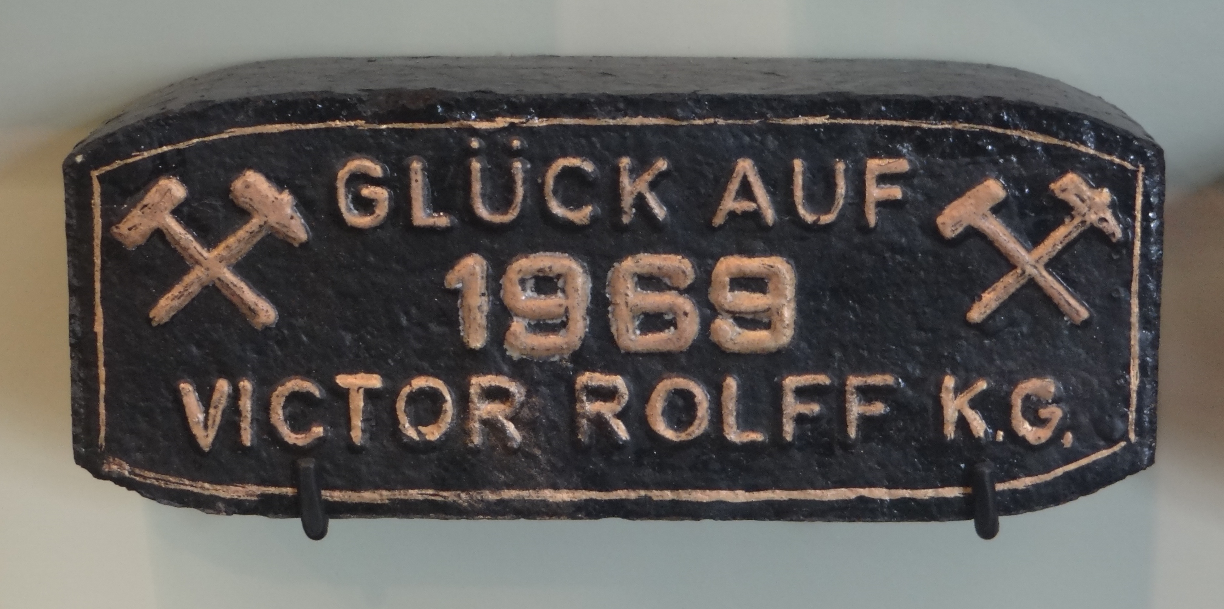 Deutsches Bergbau-Museum Bochum. Halle 19: Aufbereitung und Rohstoffveredlung. Kohlebrikettierung: Schmuckbriketts